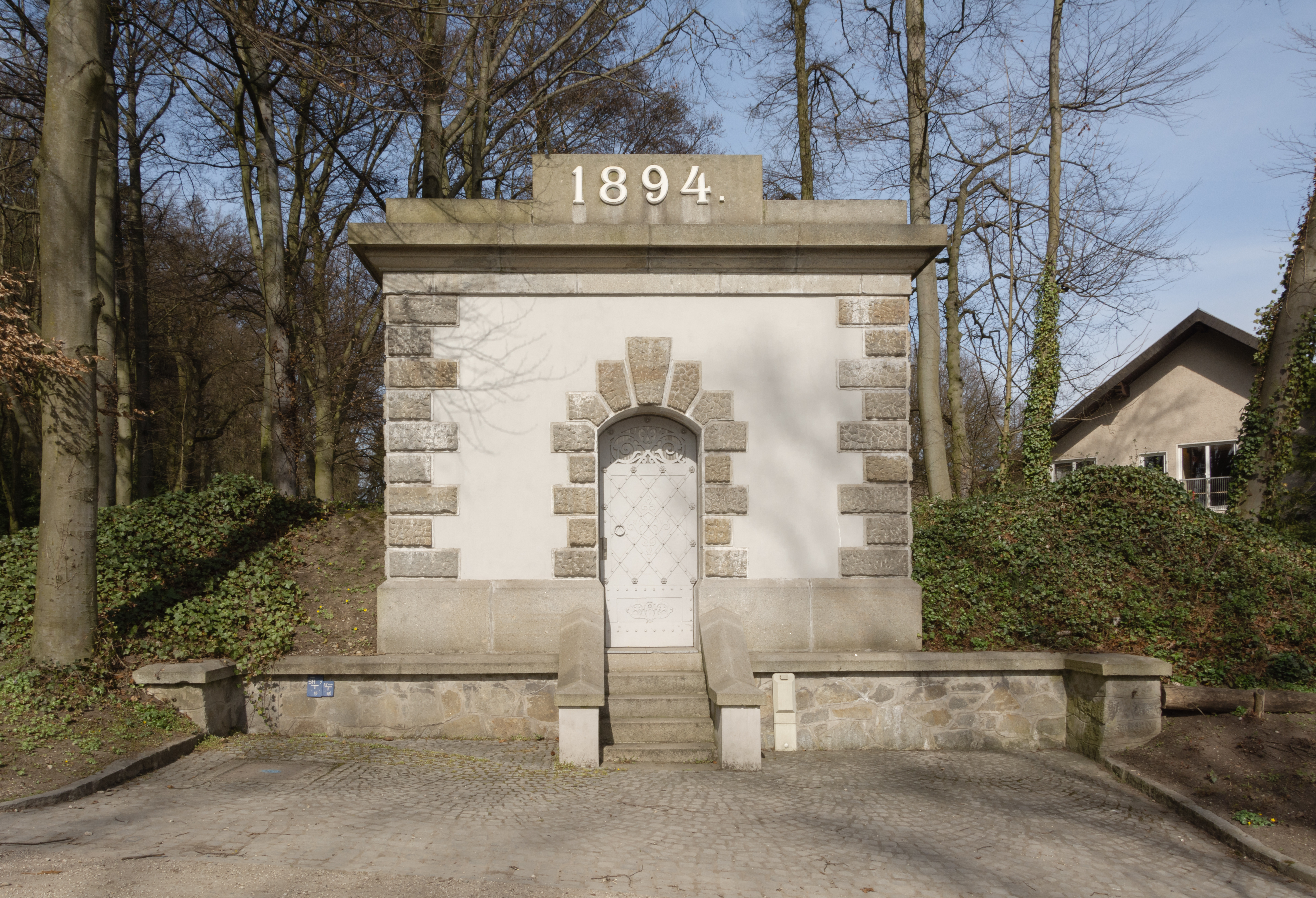 Der Hochbehälter steht in der Nähe des Bildungshauses Jägermayrhof der Arbeiterkammer Oberösterreich.